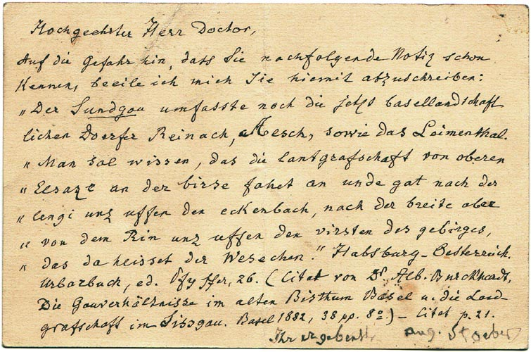 Stöber, August: Eigenhändige Postkarte mit Unterschrift. Auf der Rückseite einspaltig in schwarzbrauner Tinte beschriftet, die Unterschrift in Bleistift. Recto die eigenhändige Adresse, ebenfalls in schwarzbrauner Tinte. Mühlhausen im Elsaß, 25. [?] Juni, 1882. 92 x 139 mm. Loses Kartonblatt, beidseitig beschriftet. An den Museumsdirektor, Regierungsrat und Schriftsteller August Schricker (1838–1912).